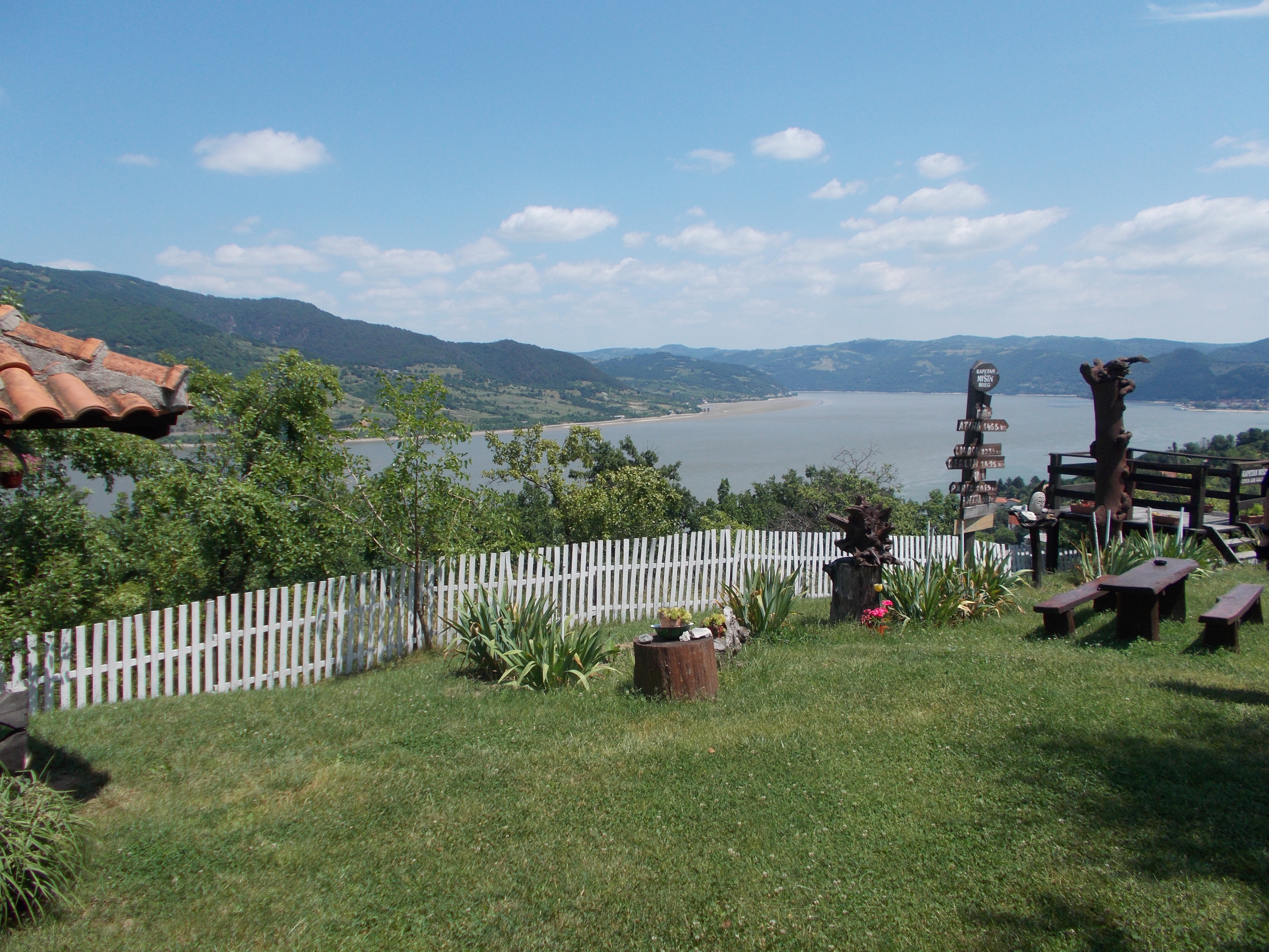 Капетан Мишин брег